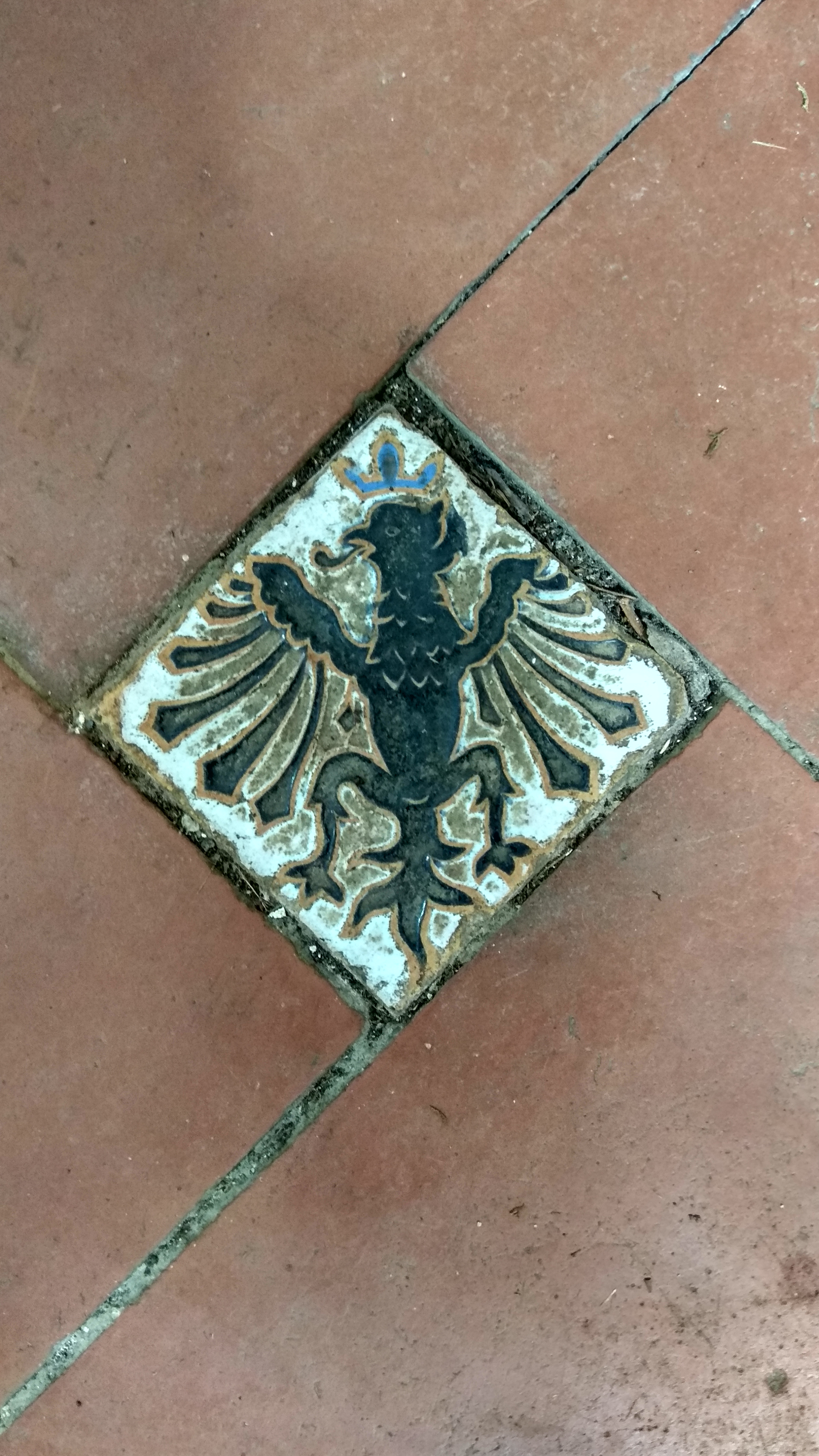 Olambrilla en el edificio de 1922, obra de Luis Elizalde en la finca "El Pinar" de Donostia. Propiedad de la familia Bergarajauregi-Satrustegi.